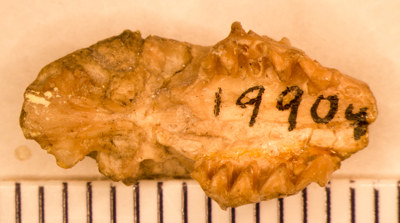 Oligoryctes cameronensis Hough, 1956